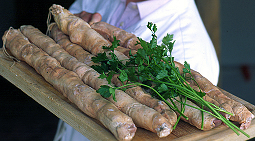 Présentation d'andouillettes par D.L., entrepreneur charcutier à Troyes.